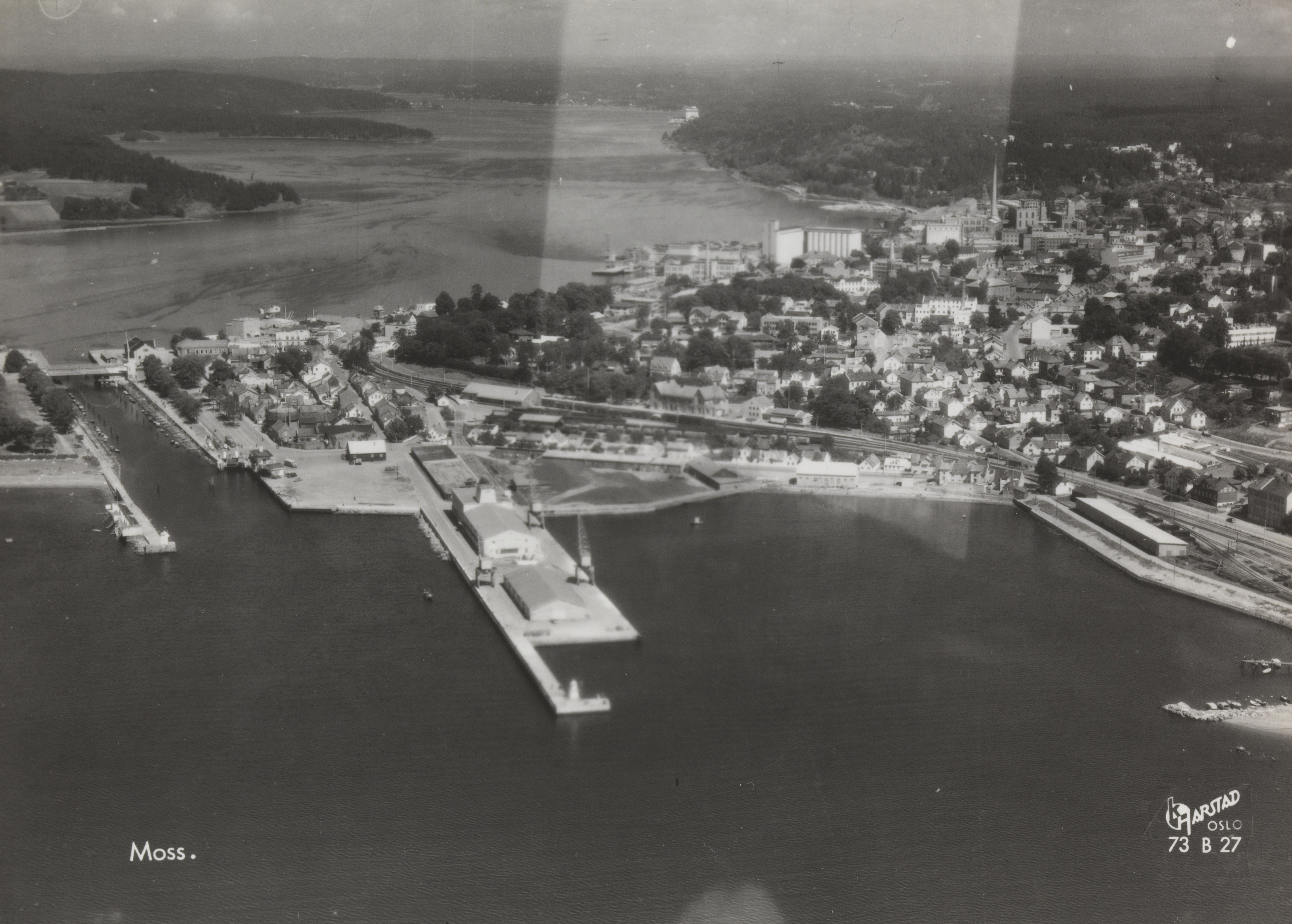 Bildet er hentet fra Nasjonalbibliotekets bildesamling Moss, Moss, Østfold